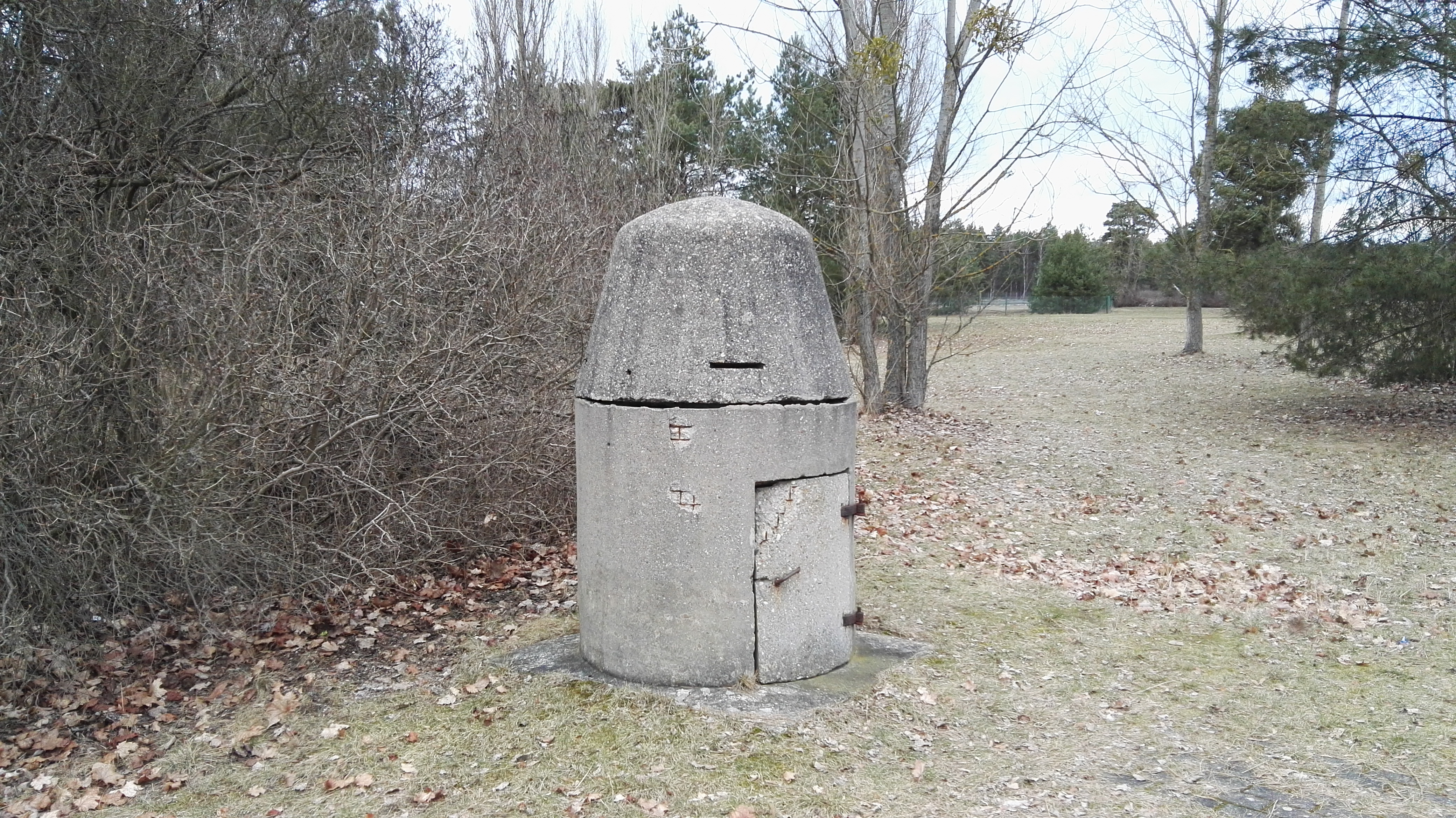 Ein-Mann-Bunker auf dem Gelände des ehemaligen KZ Außenlagers Schwarzheide